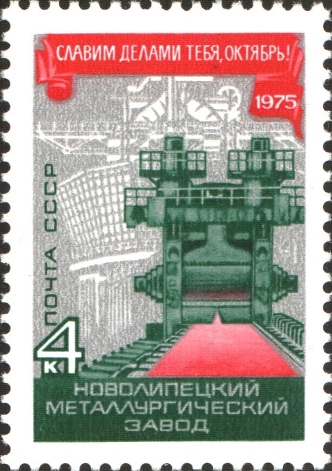 Новолипецкий металлургический завод. Клеть прокатного стана на фоне доменной печи. Серия — «58-я годовщина Великой Октябрьской социалистической революции». Художник: Е. Анискин. Марка СССР 1975г., номинал - 4коп. Тираж — 5,3 млн экз.